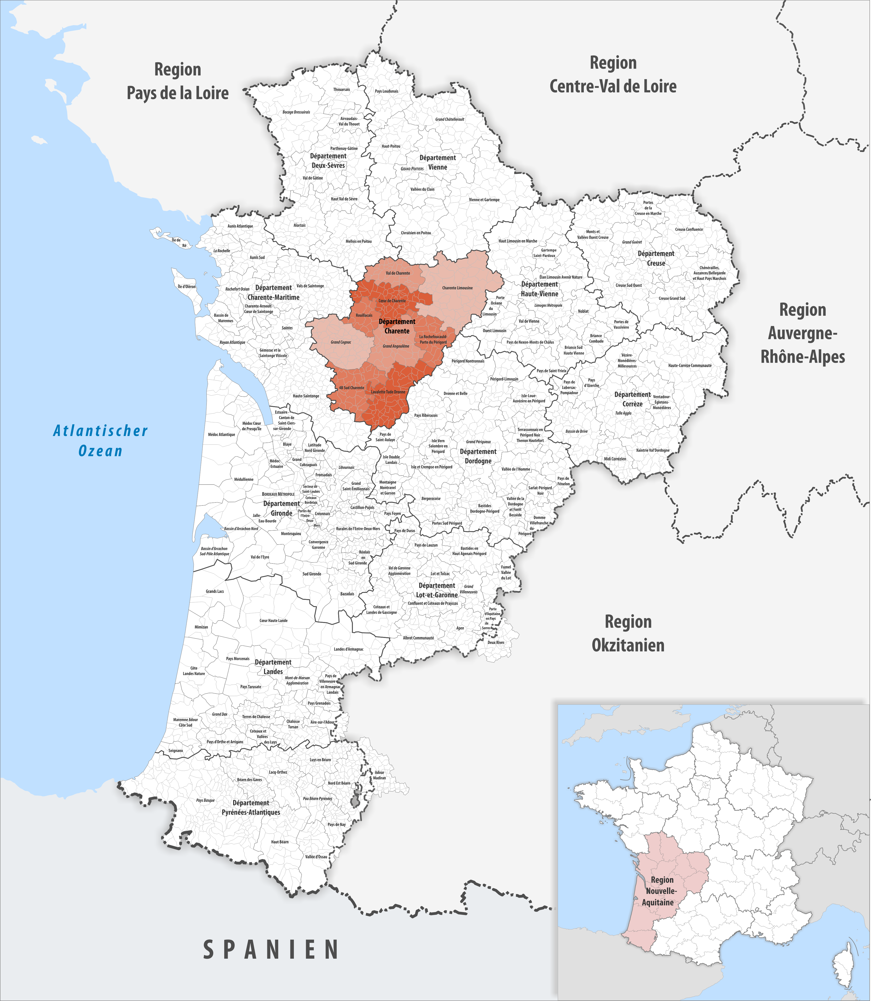 Gemeindeverbände im Département Charente